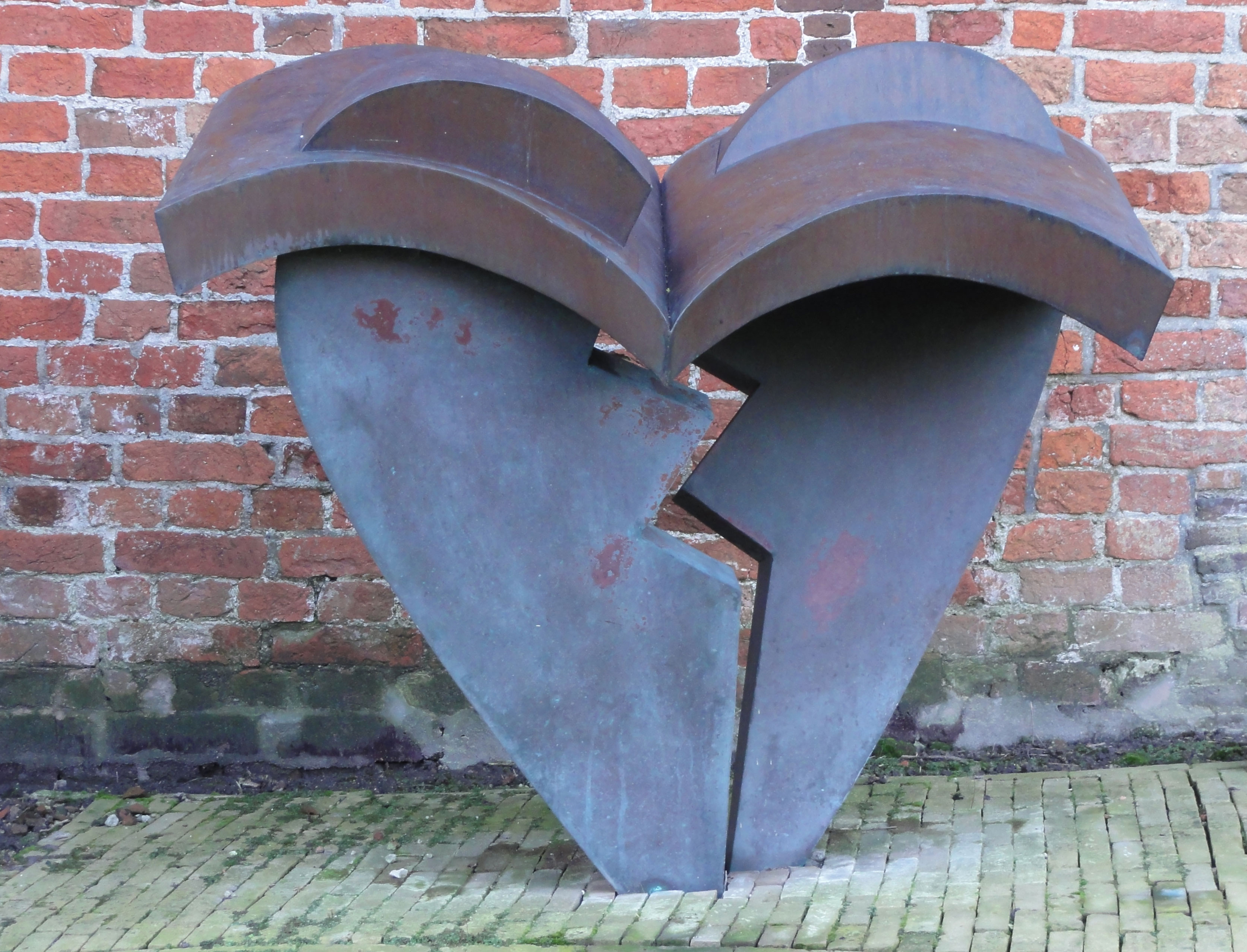 Monument voor Francois Haverschmidt (Piet Paaltjens) in Foudgum door Hillie van der Gang (1964-2001)